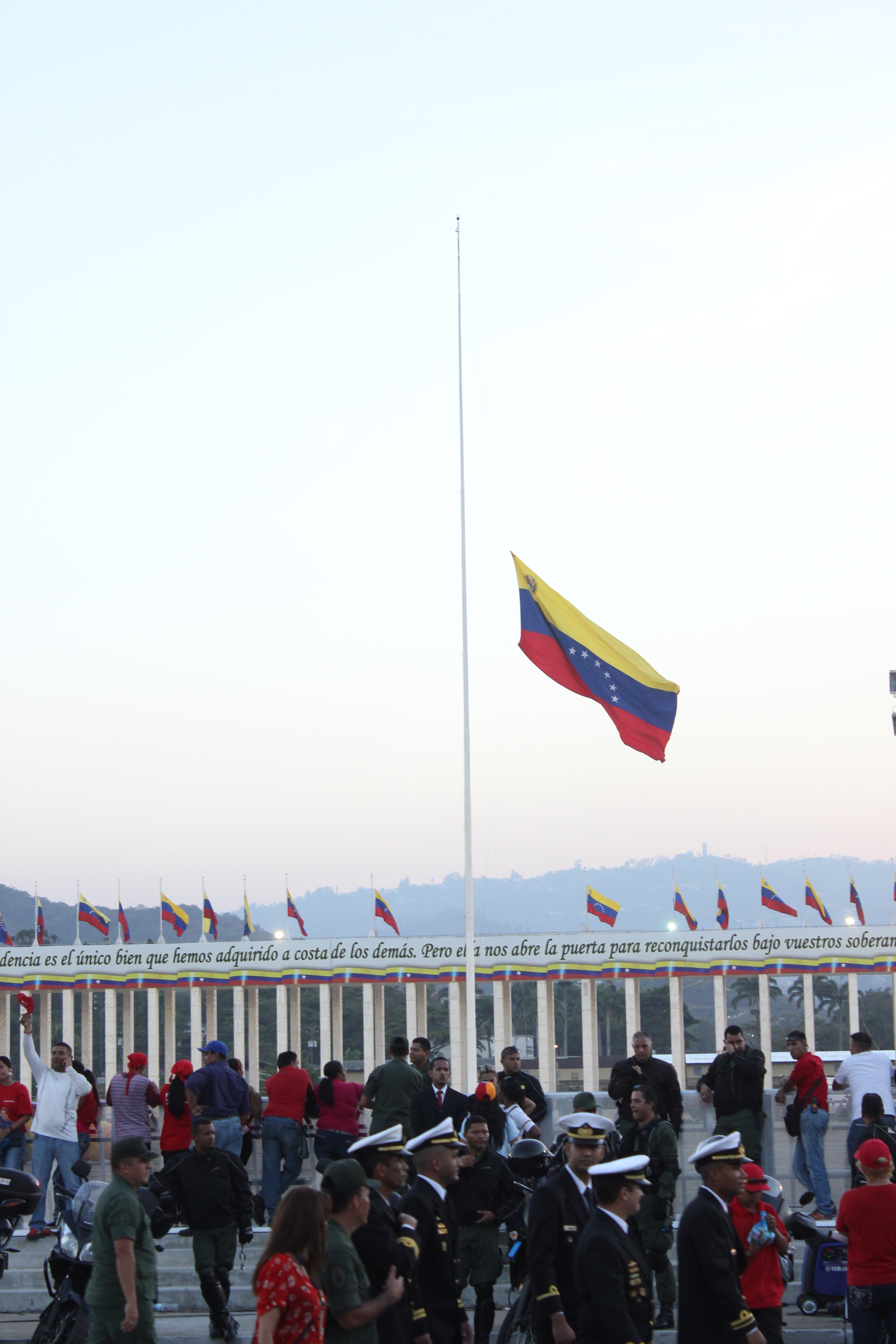 Paseolo los Próceres, cortejo fúnebre de Hugo Chavez.